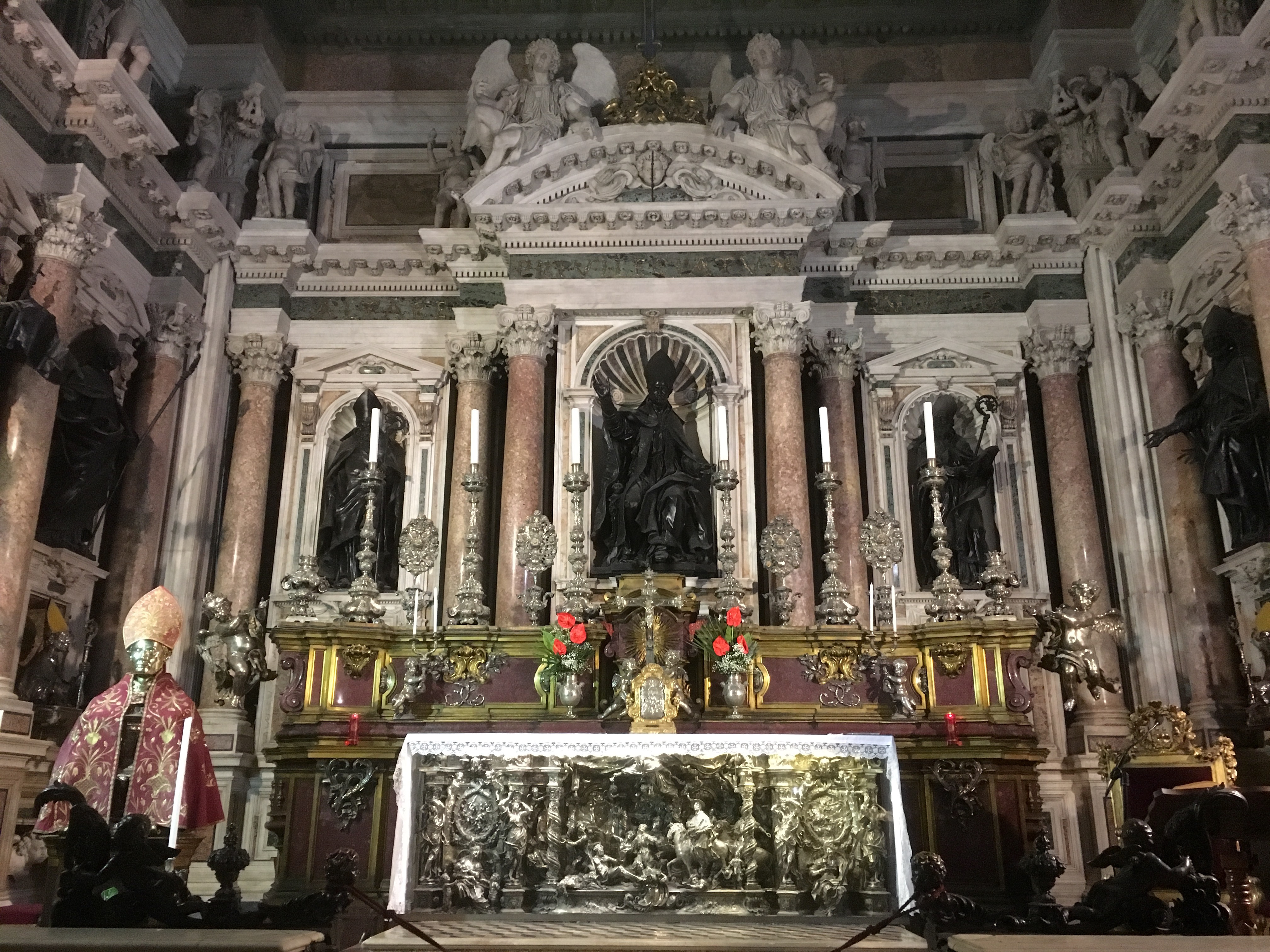 Nápoles. Capilla del Tesoro de San Gennaro. Altar mayor.